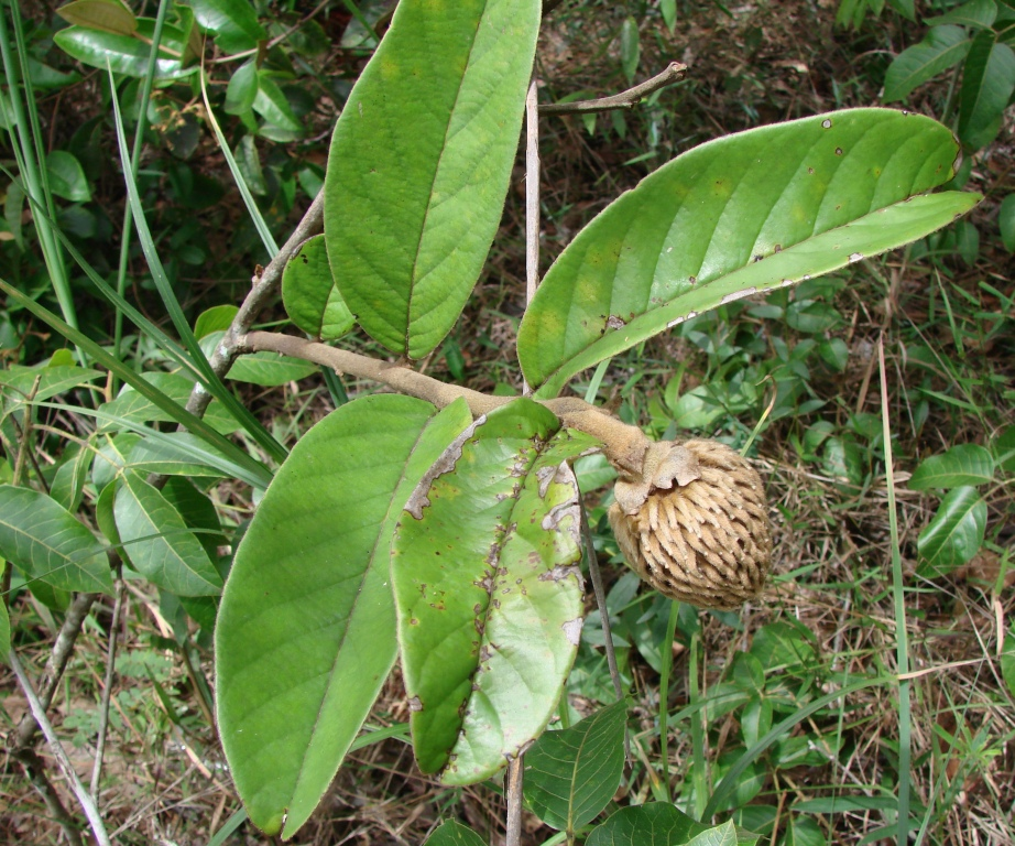 Annona monticola - ANNONACEAE Jardim Botânico de Brasília - Distrito Federal - Brasil.